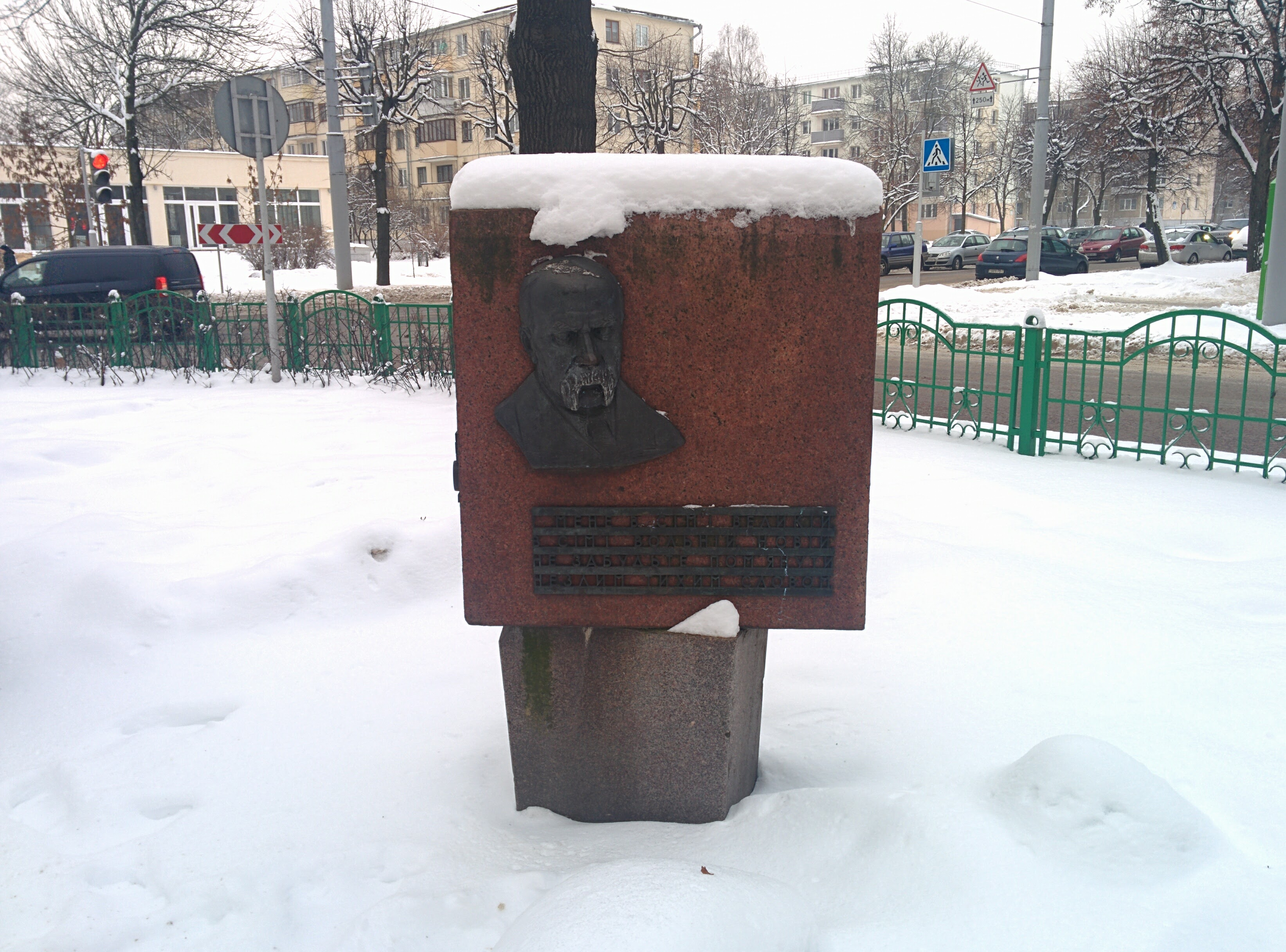 Бульвар Шаўчэнкі, Мінск